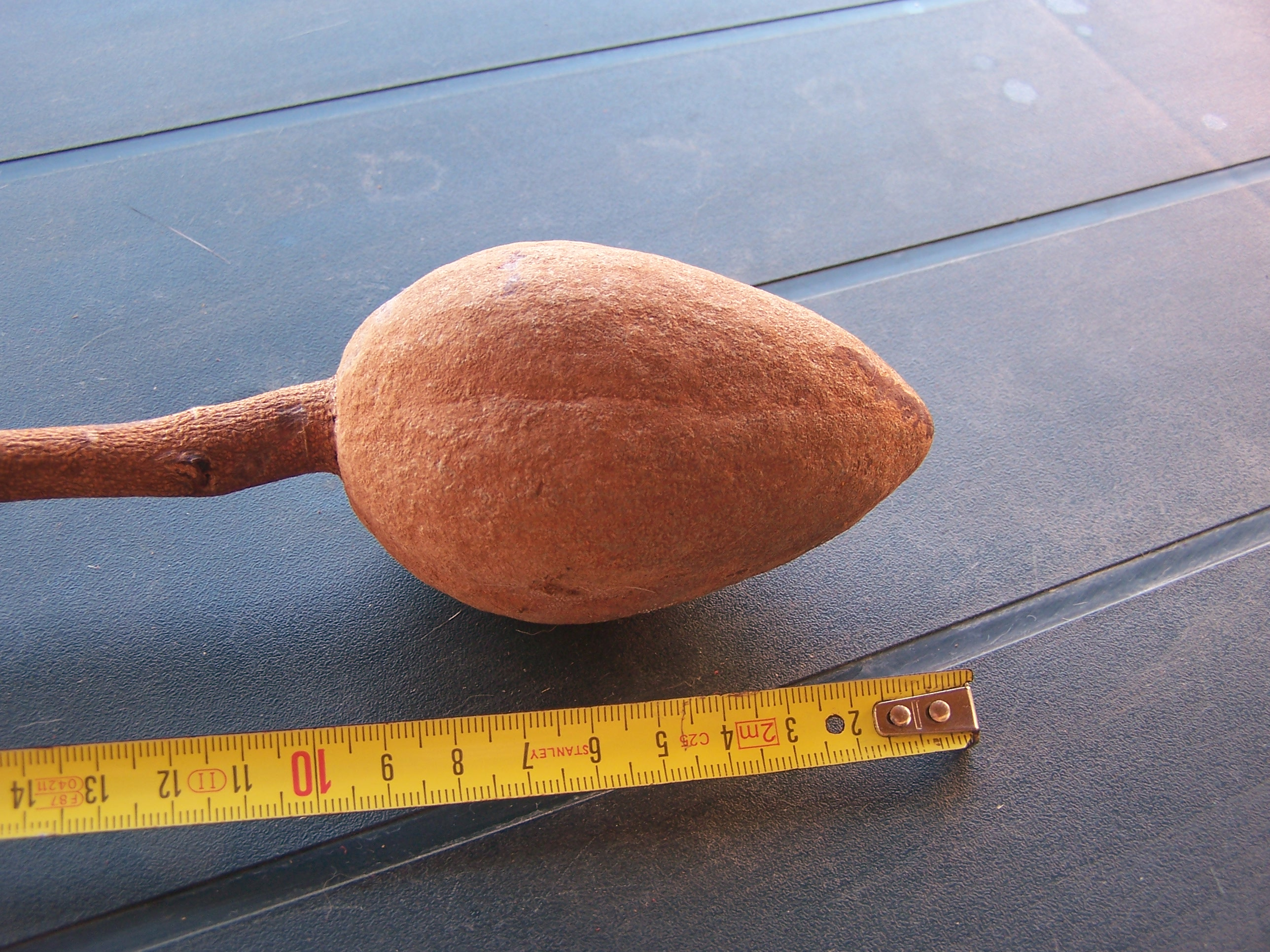 Fruit du mahogany